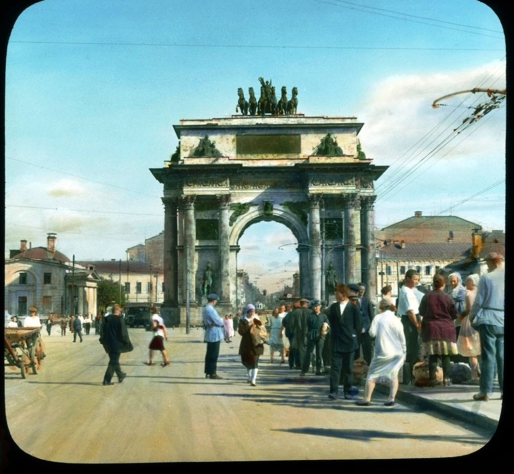 Москва. Тверская застава